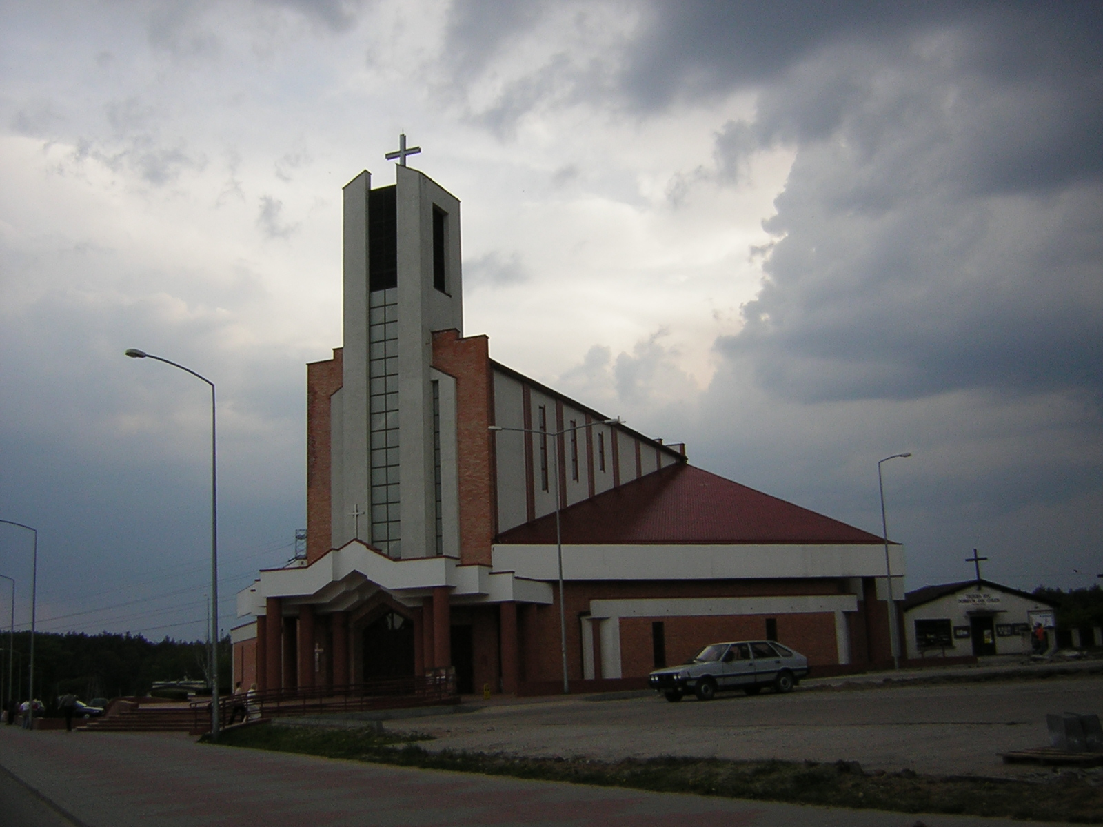 Kościół pw. św. Brata Alberta w Iławie MARCIN N 14:52, 23 May 2006 (UTC) Autor: Marcin n